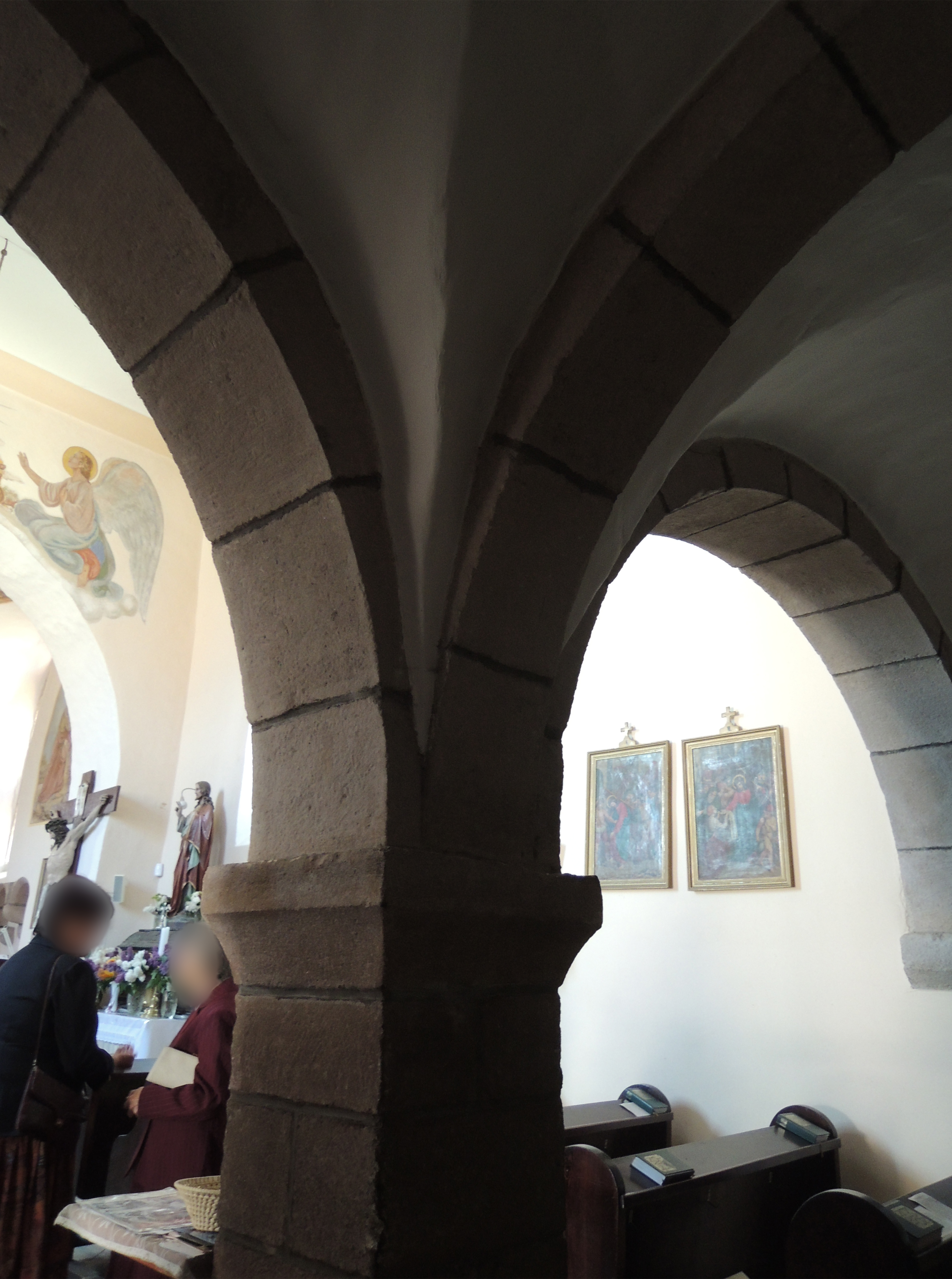 Pohled na podpěrný sloup empory v kostele sv. Václava, Chřenovice